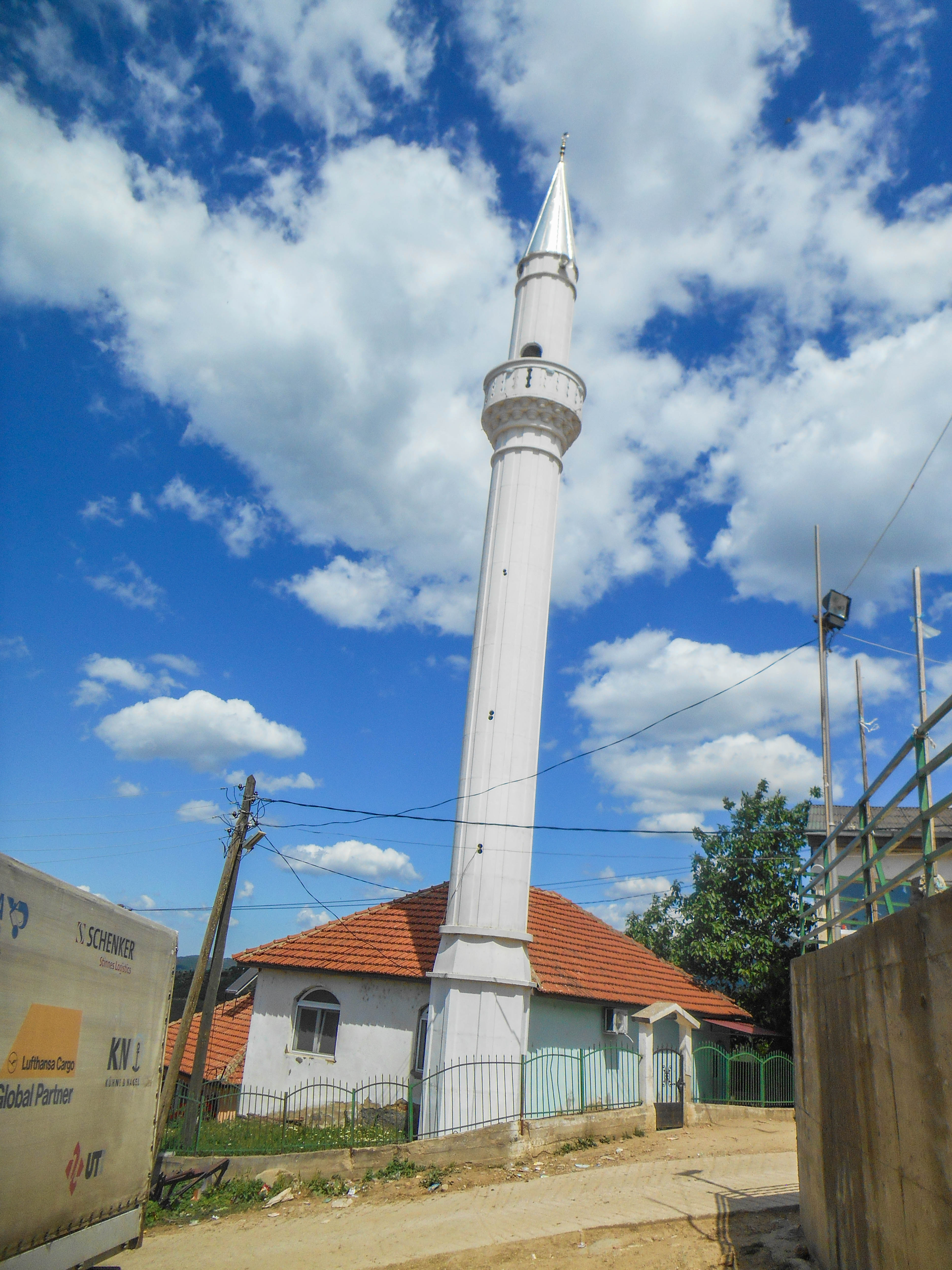 Џамија во Висока Маала